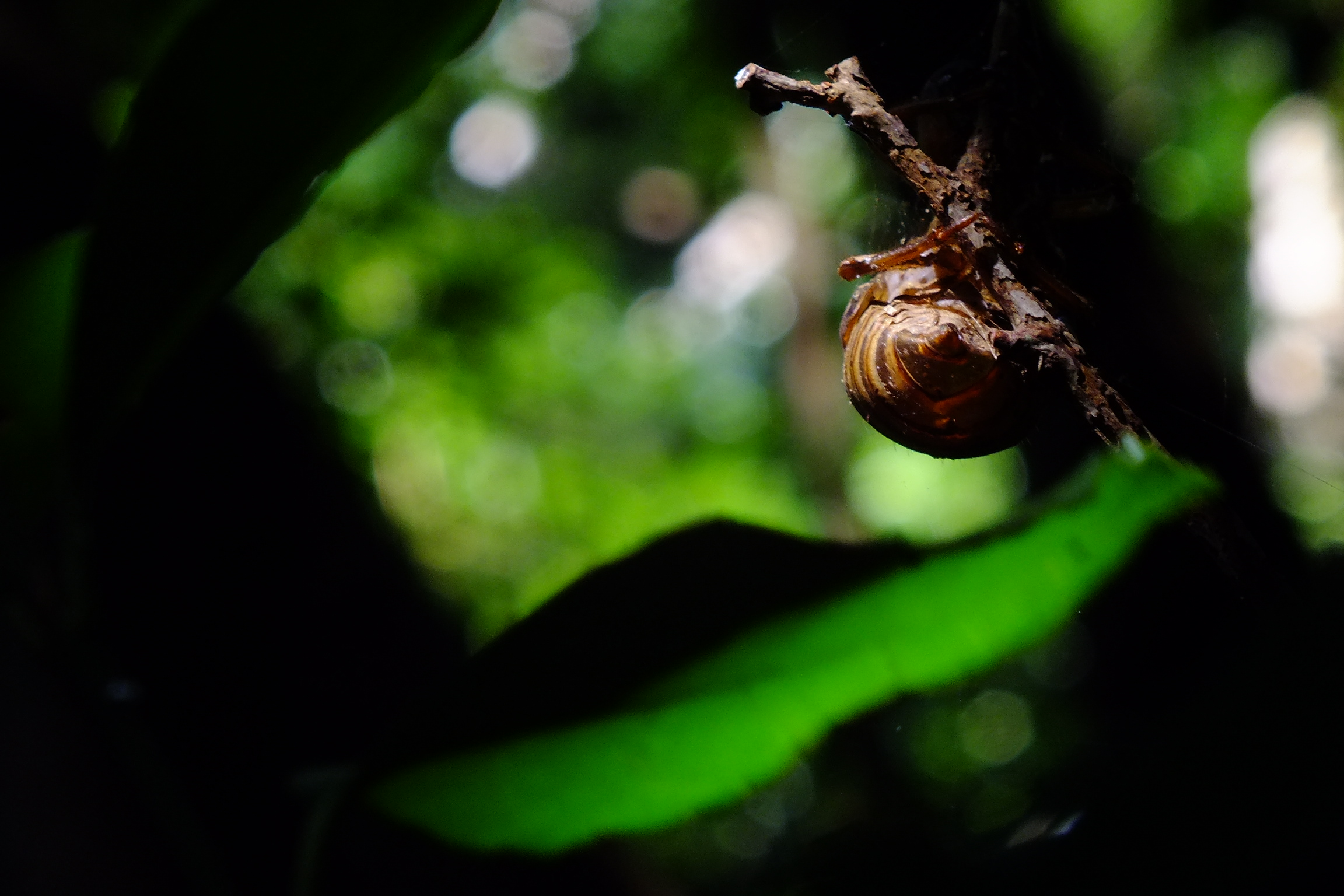 蝉の抜け殻 神島にて 2016-08-05 Cicadidae exuvia in Kami-shima Island